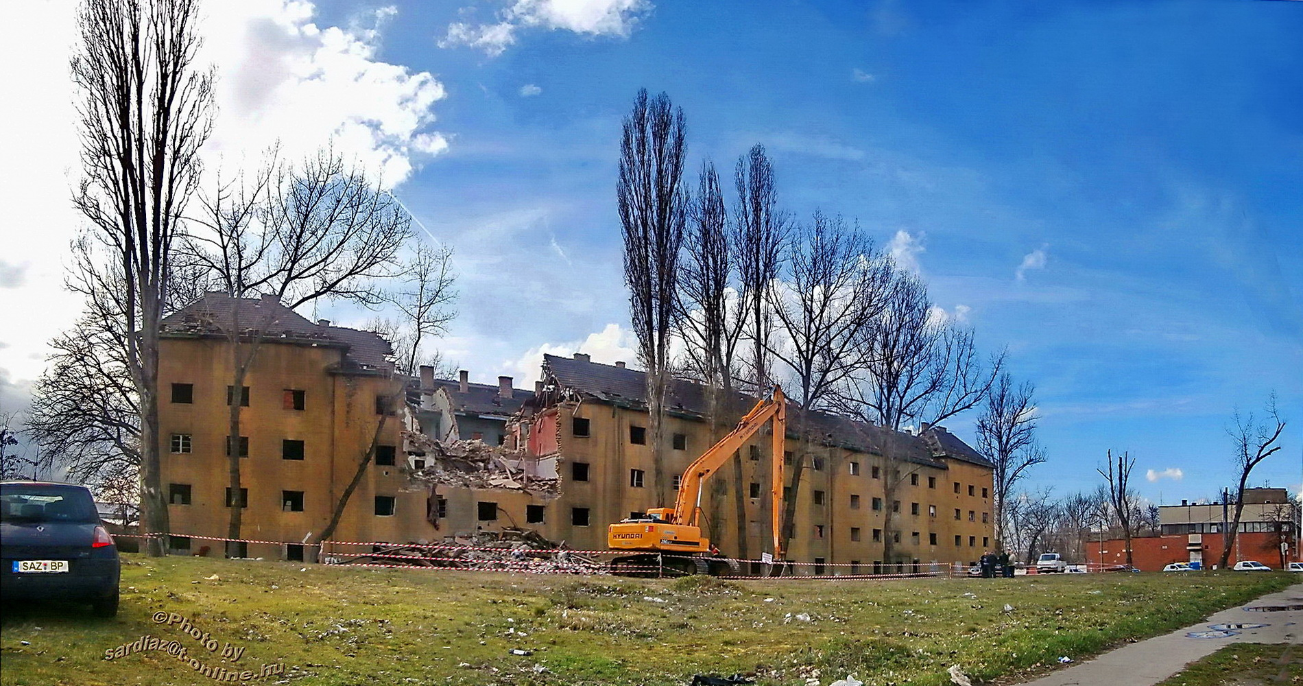 Dzsumbuj, egykori szükséglakás-telep Budapest IX. kerületében, az Illatos út és a Gubacsi út sarkánál, a második ház bontása